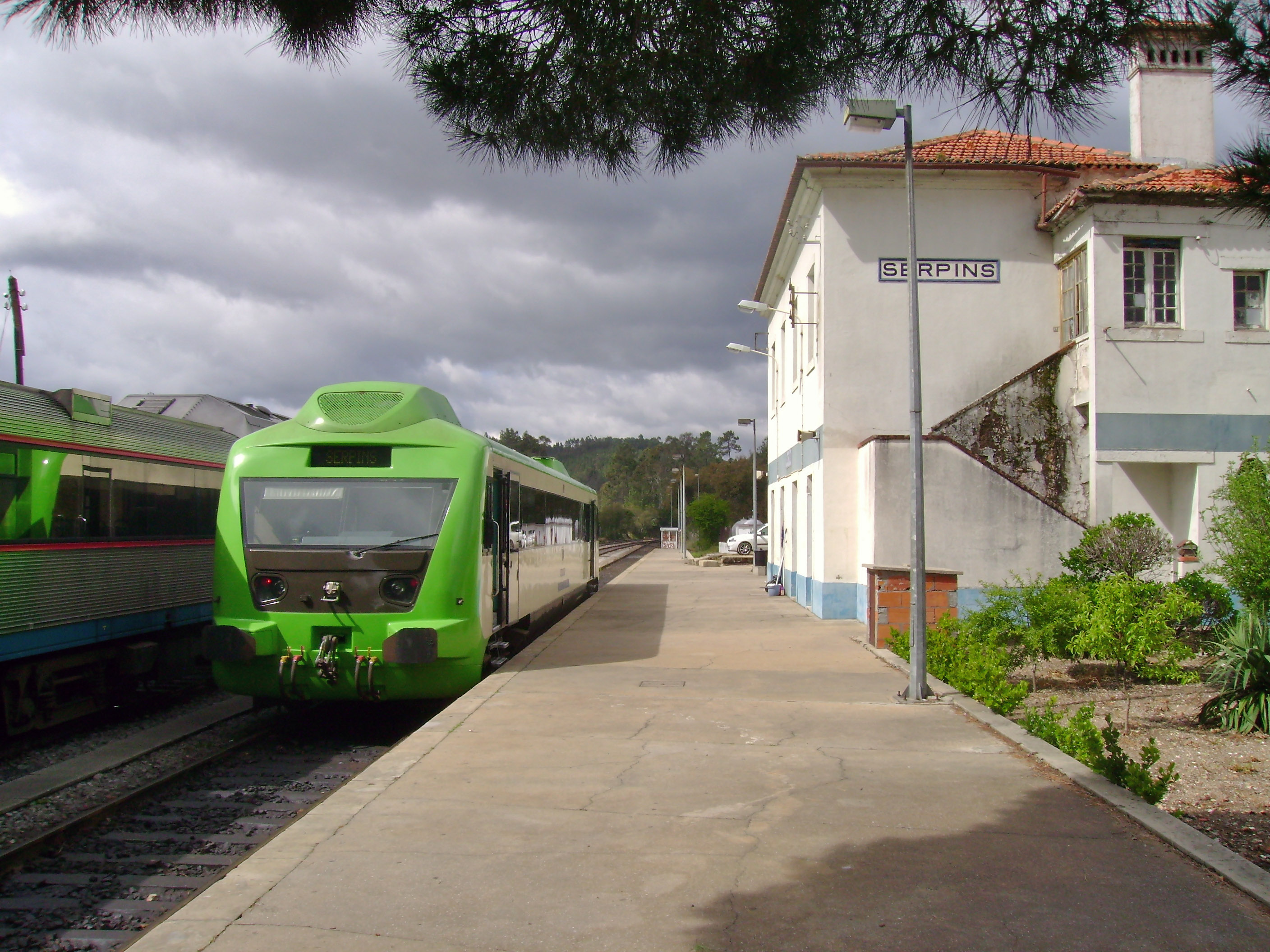 CP0350 em Seprins, Abril 2008